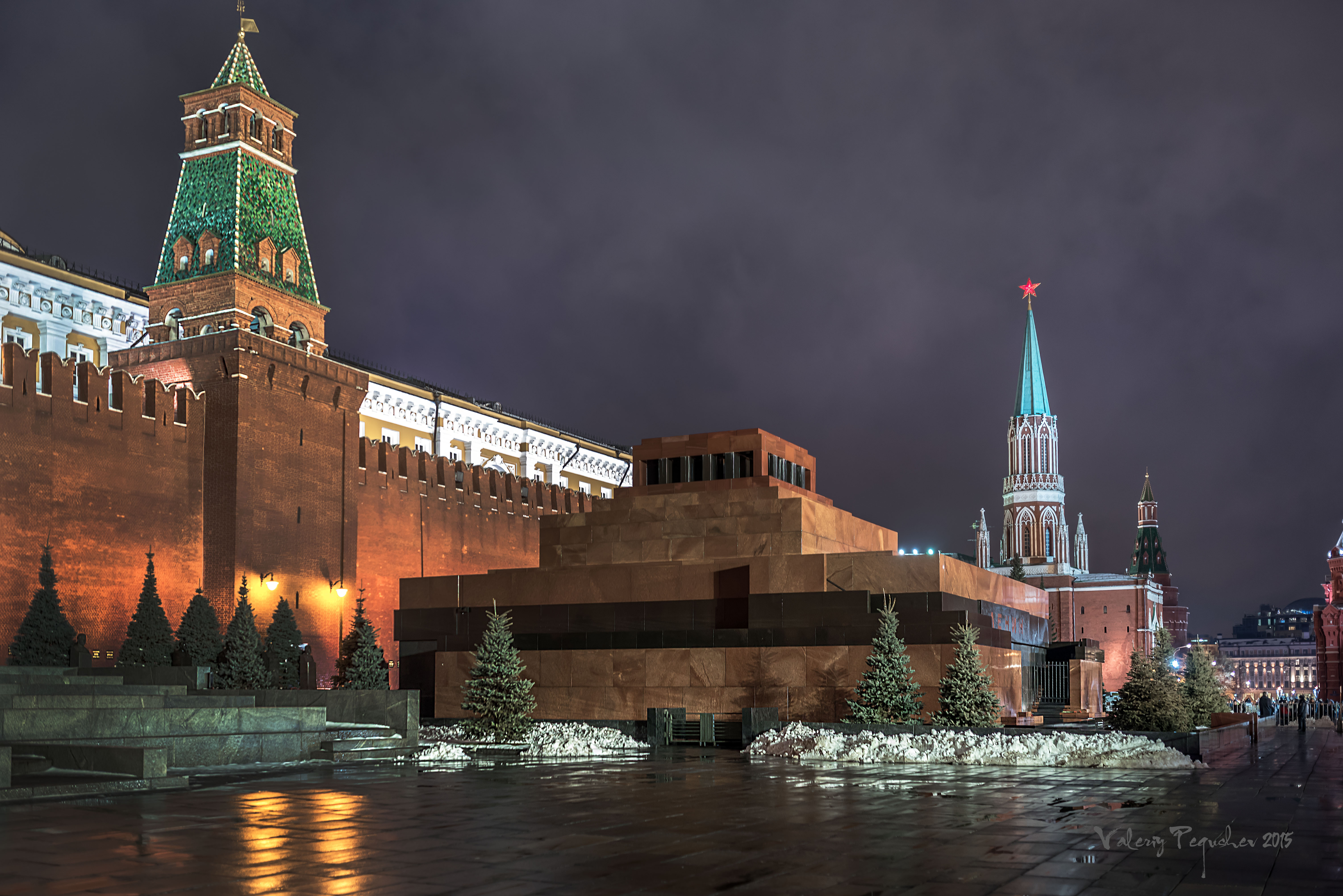 Мавзолей Ленина Владимира Ильича: Тверской, Центральный округ, Москва